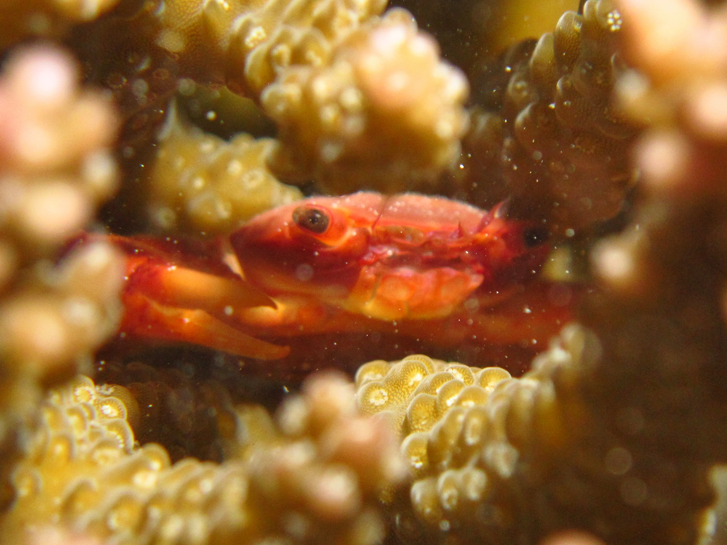 Un crabe trapézie (Trapezia sp.), aux Maldives (atoll de Baa).